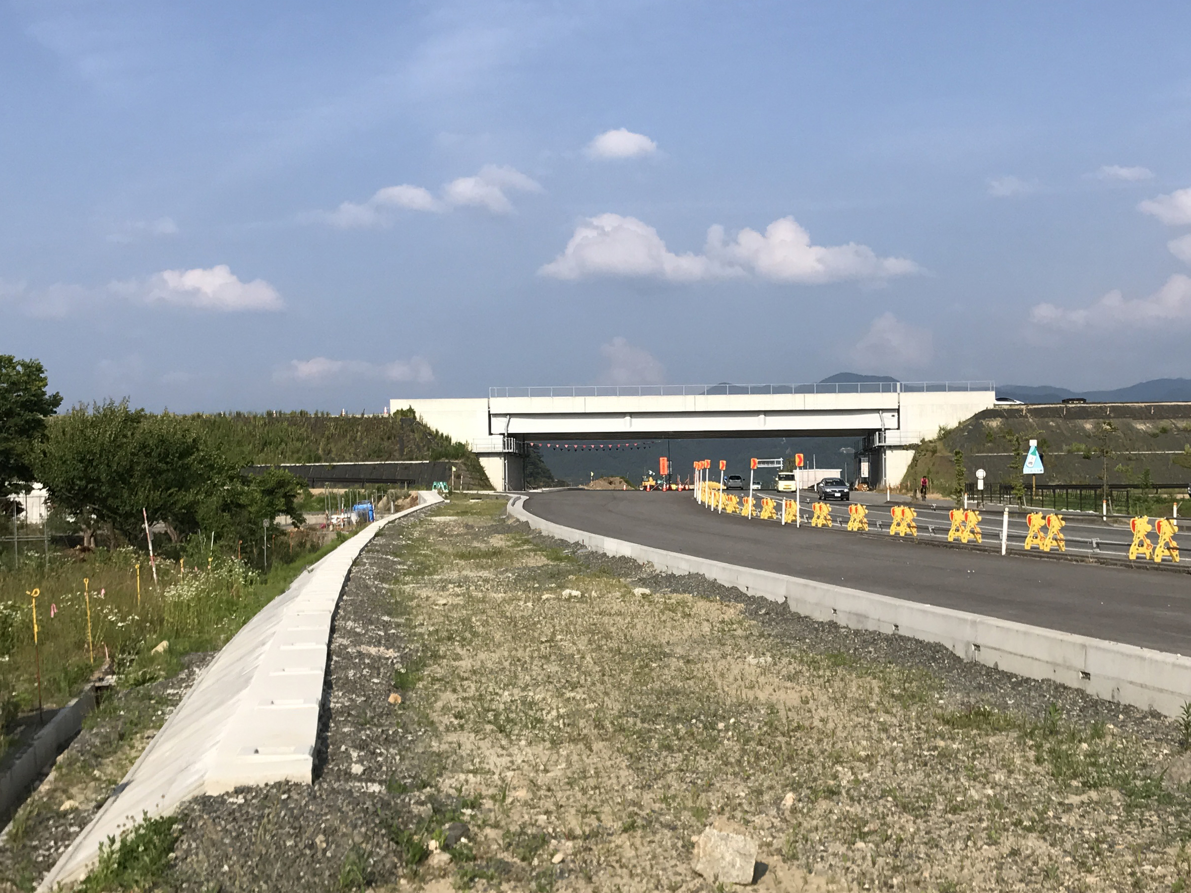 建設中の東北中央自動車道 米沢中央IC